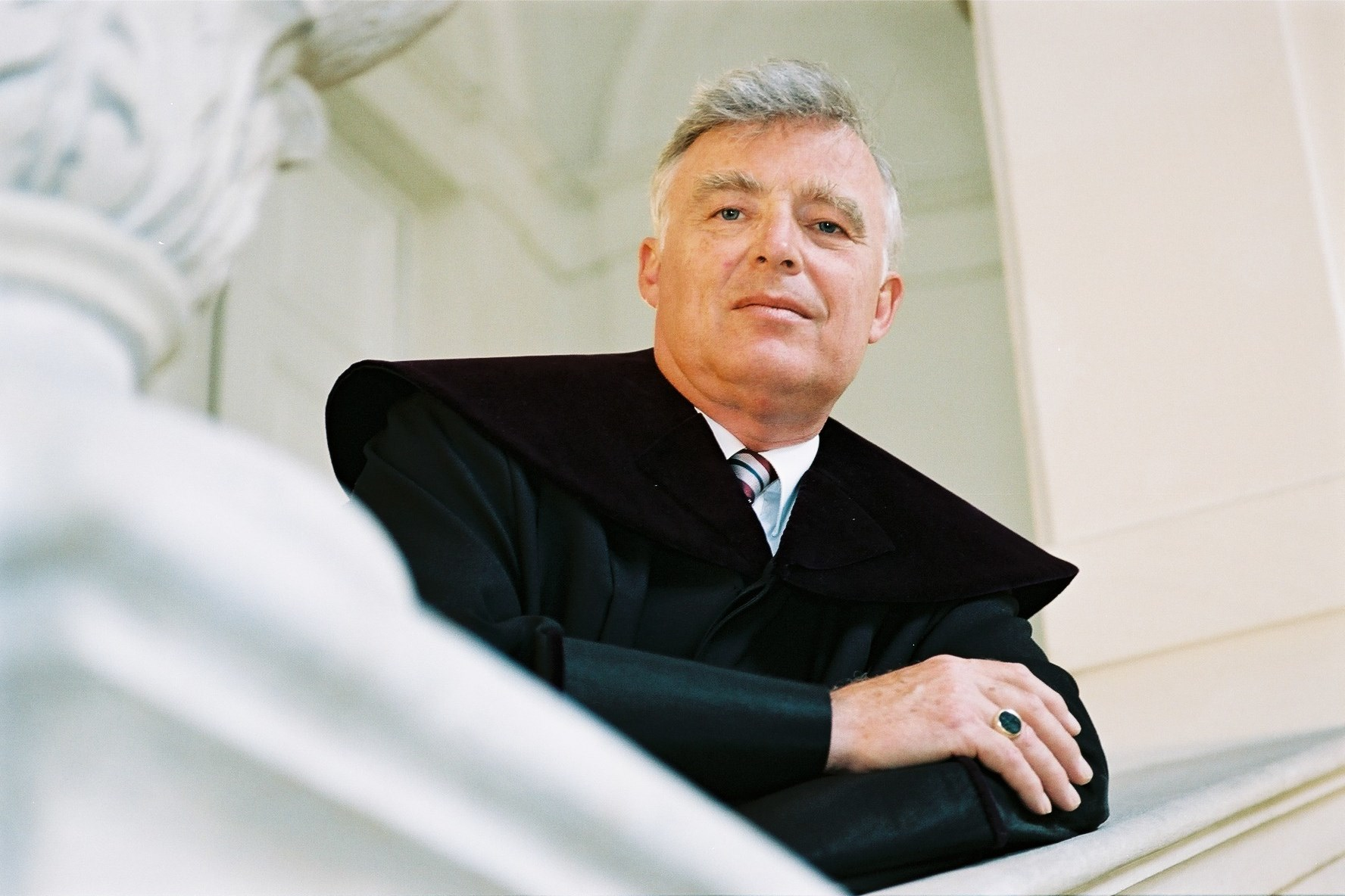 Dr. Herbert Haller ist ein österreichischer Jurist und ehemaliger Verfassungsrichter. Hier auf einem Bild aus dem Jahr 2003.